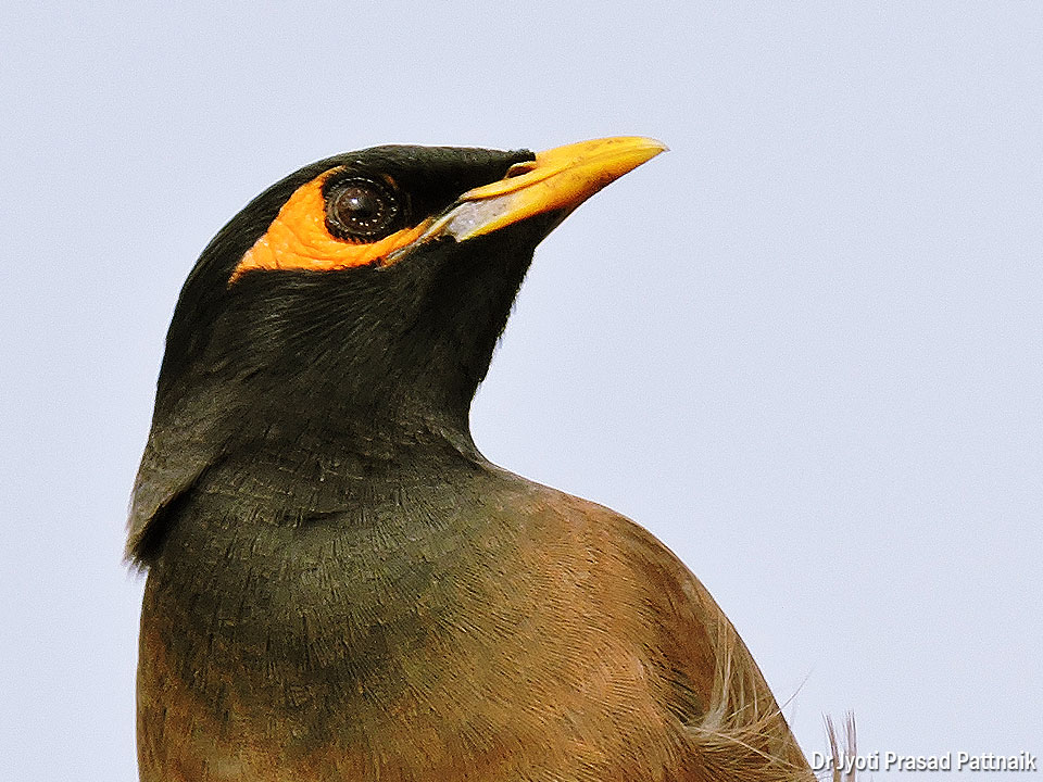 ଓଡ଼ିଆ: ବଣି ବା ସାଧାରଣତଃ ମଇନା ବା ଭାରତୀୟ ମଇନା ଭାବରେ ପରିଚିତ ଏହି ପକ୍ଷୀ ଦଳ ଦଳ ହୋଇ ବସବାସ କରନ୍ତି୤ ଜନବସତି ନିକଟରେ ଏମାନେ ରହିବାର ଦେଖାଯାଏ୤ ବର୍ତ୍ତମାନ ଓଡ଼ିଶାର ବିଭିନ୍ନ ସହରମାନଙ୍କରେ ମଧ୍ୟ ଏମାନେ ବହୁ ସଂଖ୍ୟାରେ ଦେଖା ଦେଇଥାନ୍ତି୤ କୀଟପତଙ୍ଗ ସହିତ ବିଭିନ୍ନ ଗଛର ଫୁଲ ଓ ଫଳ ଏମାନେ ଆହାର ଭାବରେ ଗ୍ରହଣ କରନ୍ତି୤ ଜନବସତି ନିକଟରେ ବସବାସ କରୁଥିବା ବଣିମାନେ ମନୁଷ୍ୟମାନେ ଫୋପାଡ଼ି ଦେଉଥିବା ଖାଦ୍ୟକୁ ଗ୍ରହଣ କରିଥାନ୍ତି୤ ଭାରତୀୟ ସଂସ୍କୃତିରେ ଏମାନଙ୍କର ନିଦର୍ଶନ ରହିଛି, ଉଭୟ ସଂସ୍କୃତ ଓ ପ୍ରାକୃତ ଭାଷାରେ ଲିପିବଦ୍ଧ ଅନେକ ଗ୍ରନ୍ଥରେ ମଧ୍ୟ ଏହି ପକ୍ଷୀମାନଙ୍କ ବିଷୟରେ ଉଲ୍ଲେଖ ରହିଛି୤ ମଇନା ଶବ୍ଦ ହିନ୍ଦୀରୁ ଅଣାଯାଇଥିବା ବେଳେ ଏହା ସଂସ୍କୃତ ଶବ୍ଦ ମଦନରୁ ଉଦ୍ଧୃତ ବୋଲି ଜଣାଯାଏ୤ ବଣିମାନଙ୍କ ସଂଖ୍ୟା ଦିନକୁ ଦିନ ବହୁଳମାତ୍ରାରେ ବୃଦ୍ଧିପାଉଥିବା ଦୃଷ୍ଟିରୁ ୨୦୦୦ ମସିହାରେ ଏହି ପକ୍ଷୀକୁ ବିଶ୍ବର ସବୁଠାରୁ ଦୃତବେଗରେ ବୃଦ୍ଧିପାଉଥିବା ପ୍ରଜାତି ବୋଲି ଘୋଷଣା କରାଯାଇଥିଲା୤ ବିଶ୍ବର ସର୍ବୋଚ୍ଚ ମାନ୍ୟତା ପାଇଥିବା ଶହେ ପକ୍ଷୀମାନଙ୍କ ମଧ୍ୟରେ ଏହା ଉପରର ତିନି ମଧ୍ୟରେ ରହେ, ଯାହା ଜୈବବିବିଧତା, କୃଷିପ୍ରଣାଳୀ ଓ ମନୁଷ୍ୟର ବ୍ୟବହାରକୁ ନେଇ ପରିବର୍ତ୍ତନଶୀଳ ବୋଲି କୁହାଯାଏ୤ କିନ୍ତୁ ଫସଲ ନଷ୍ଟ କରୁଥିବା ହେତୁ ଅଷ୍ଟ୍ରେଲିଆରେ ଏହି ପକ୍ଷୀକୁ ପରିବେଶପାଇଁ ହାନିକାରକ ବୋଲି କୁହାଯାଇଛି୤ ସାଧାରଣତଃ ଏହା ସମତଳ ଭୁଇଁରେ ଘାସ ମଝିରେ ବୁଲିବୁଲି ଝିଣ୍ଟିକାମାରି ଖାଏ୤ ଭୂମିଉପରେ ଚାଲିବା ସହ ଏହା ଡେଇଁ ଡେଇଁ ମଧ୍ୟ ଯାଏ ଏବଂ ବହୁଦୁର ପର୍ଯ୍ୟନ୍ତ ଉଡ଼ିଯାଇପାରେ୤